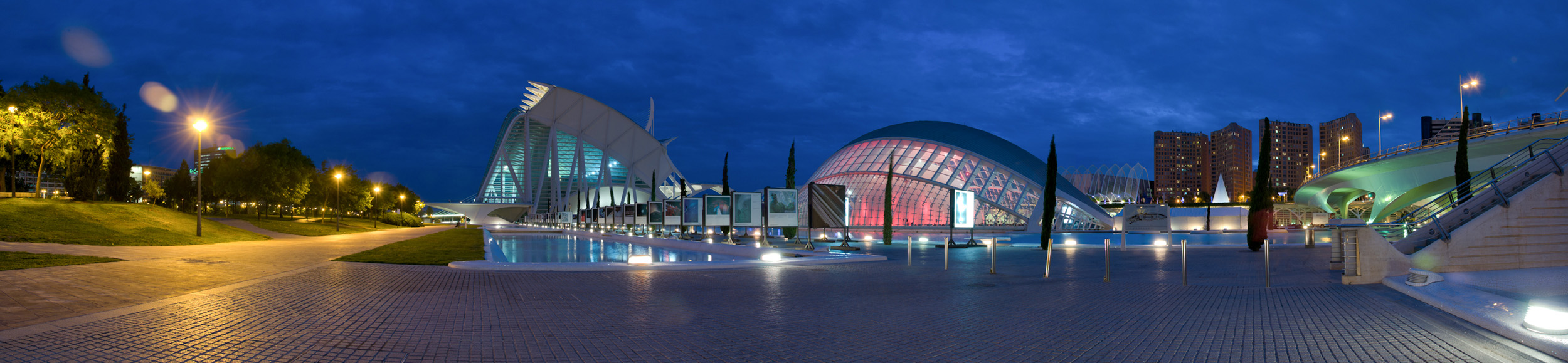 Todas las fotos: Fotos de Valencia